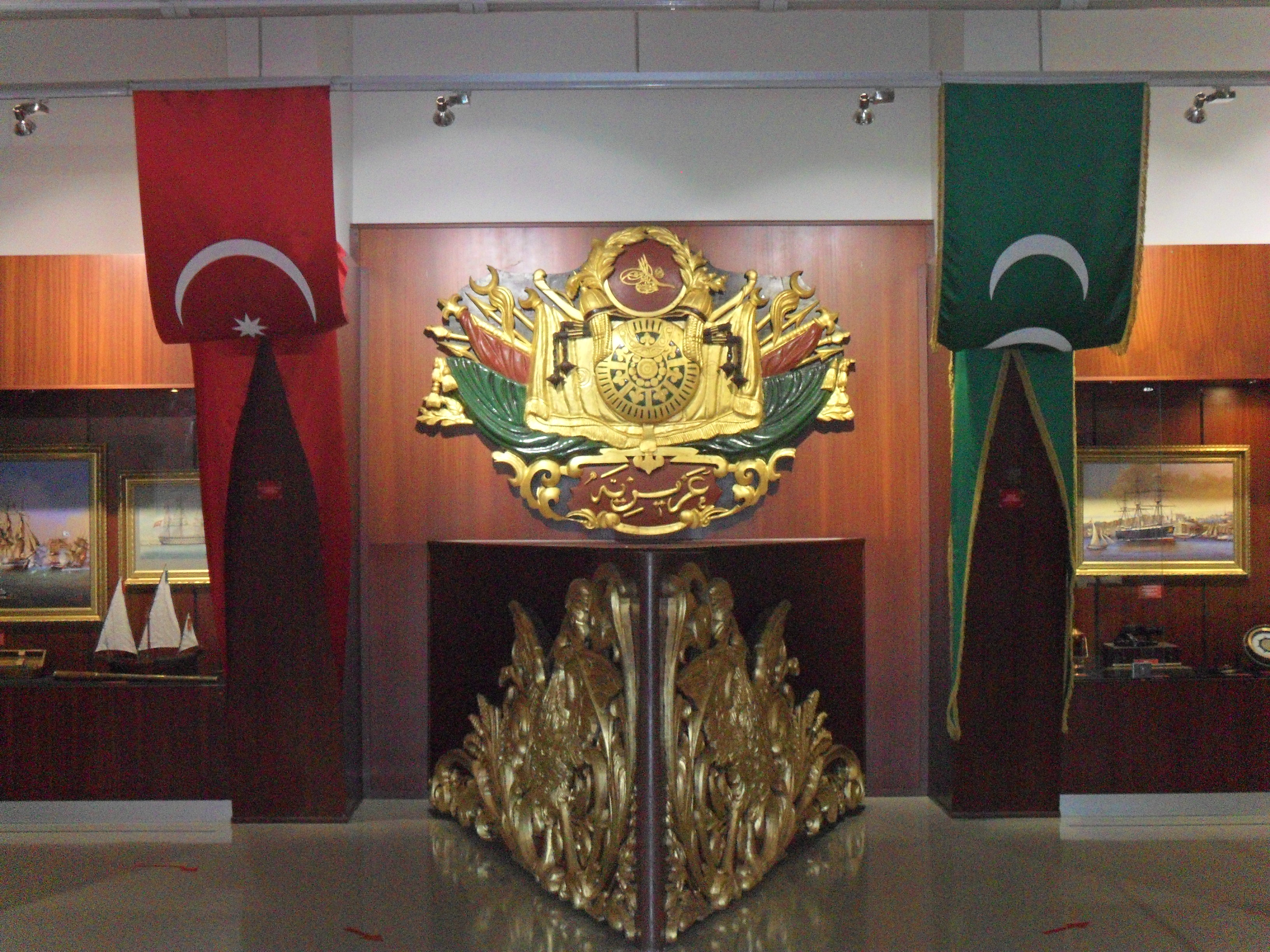 Mersin Deniz Müzesinde sergilenmekte olan Aziziye fırkateyninin kıç arması.